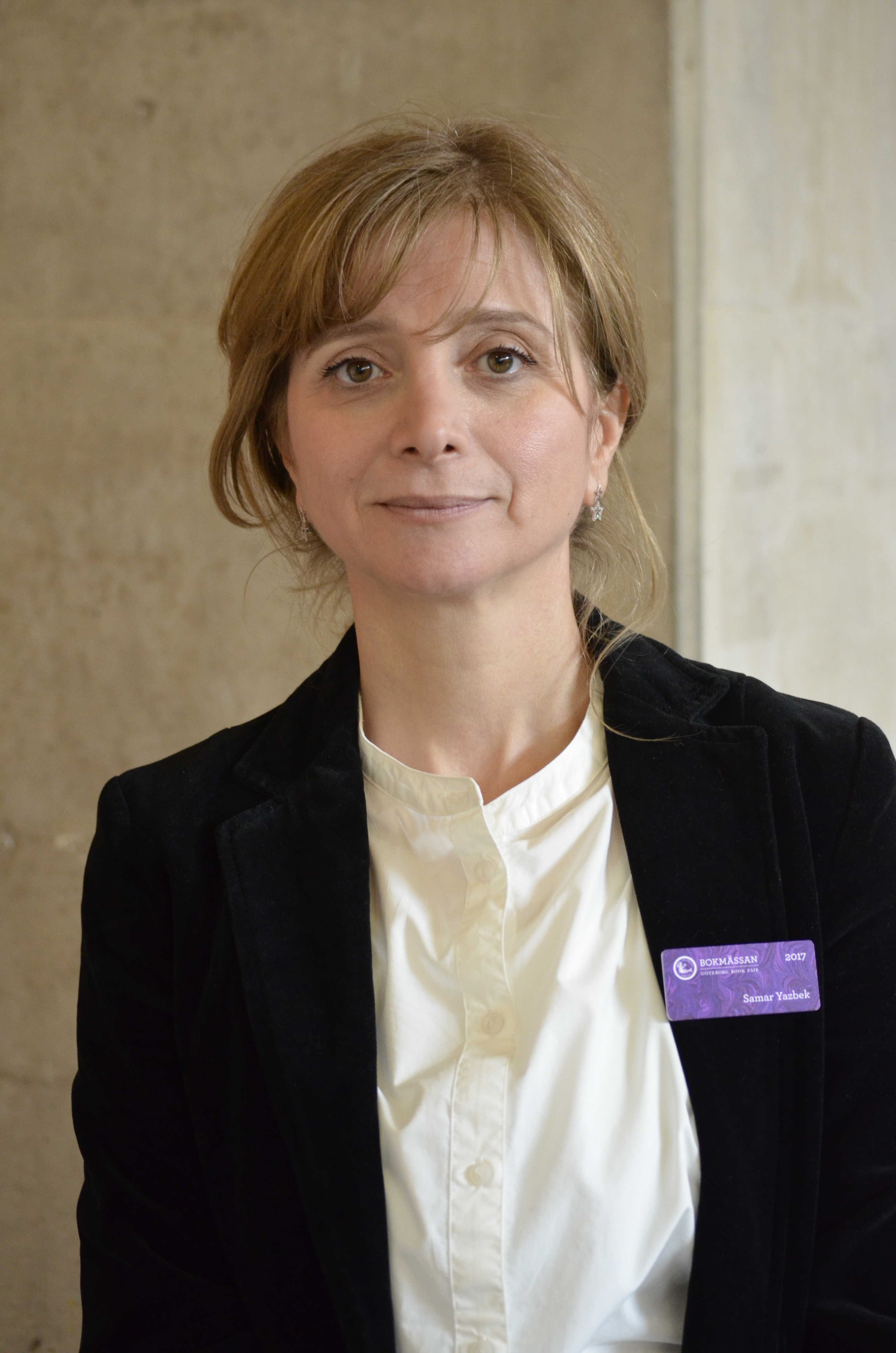 Samar Yazbek Världskulturmuseet Göteborg 2017